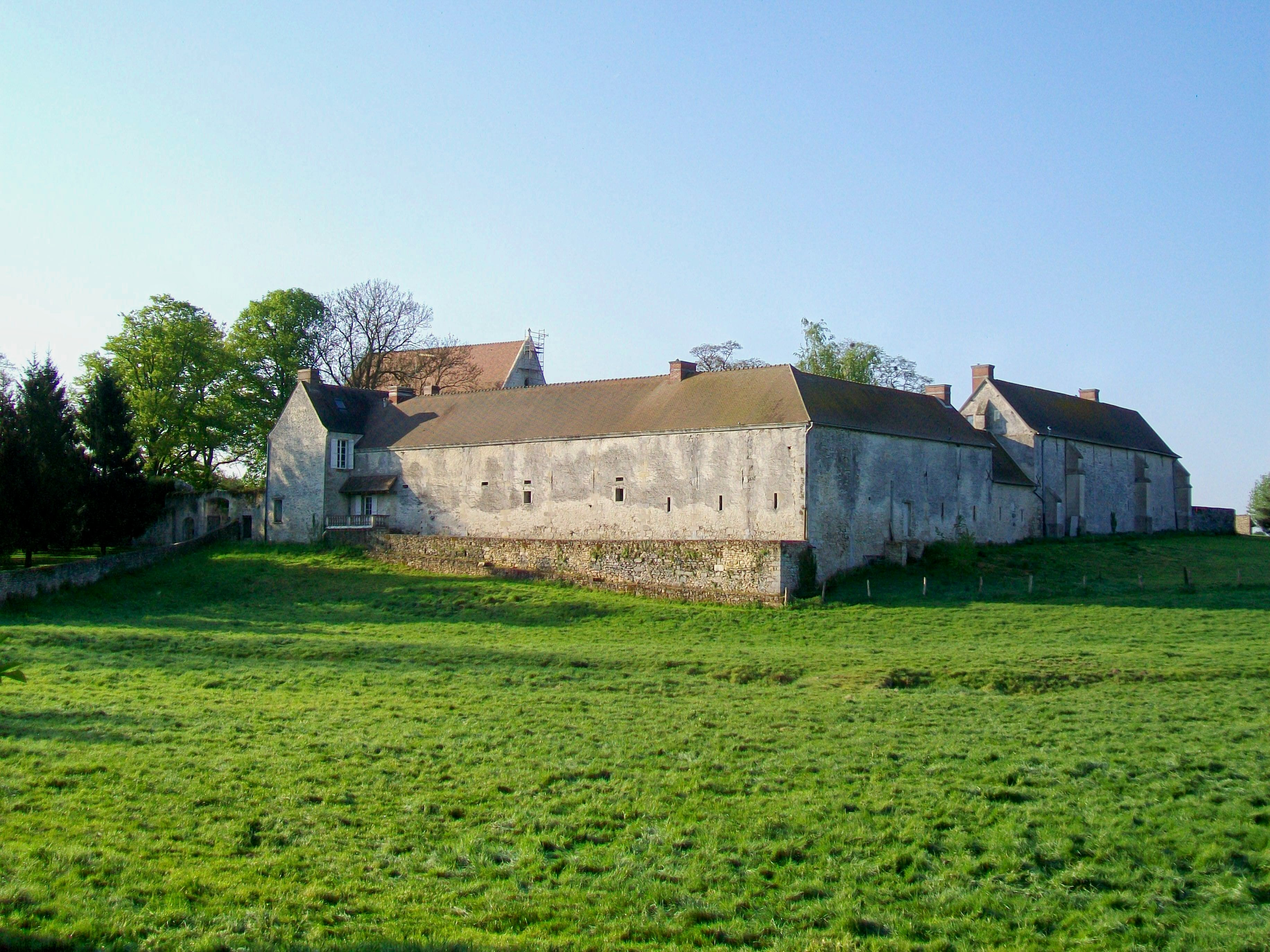 Vue d'ensemble du prieuré Saint-Victor de Bray, commune de Rully (Oise), depuis le nord-ouest. Les murs extérieurs de la ferme du prieuré se caractérisent par leur caractère défensif. A gauche, le portail. L'ensemble est surmonté par le toit de la chapelle.